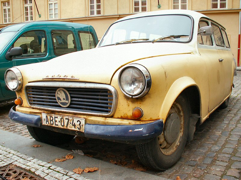 Škoda 1202Skoda